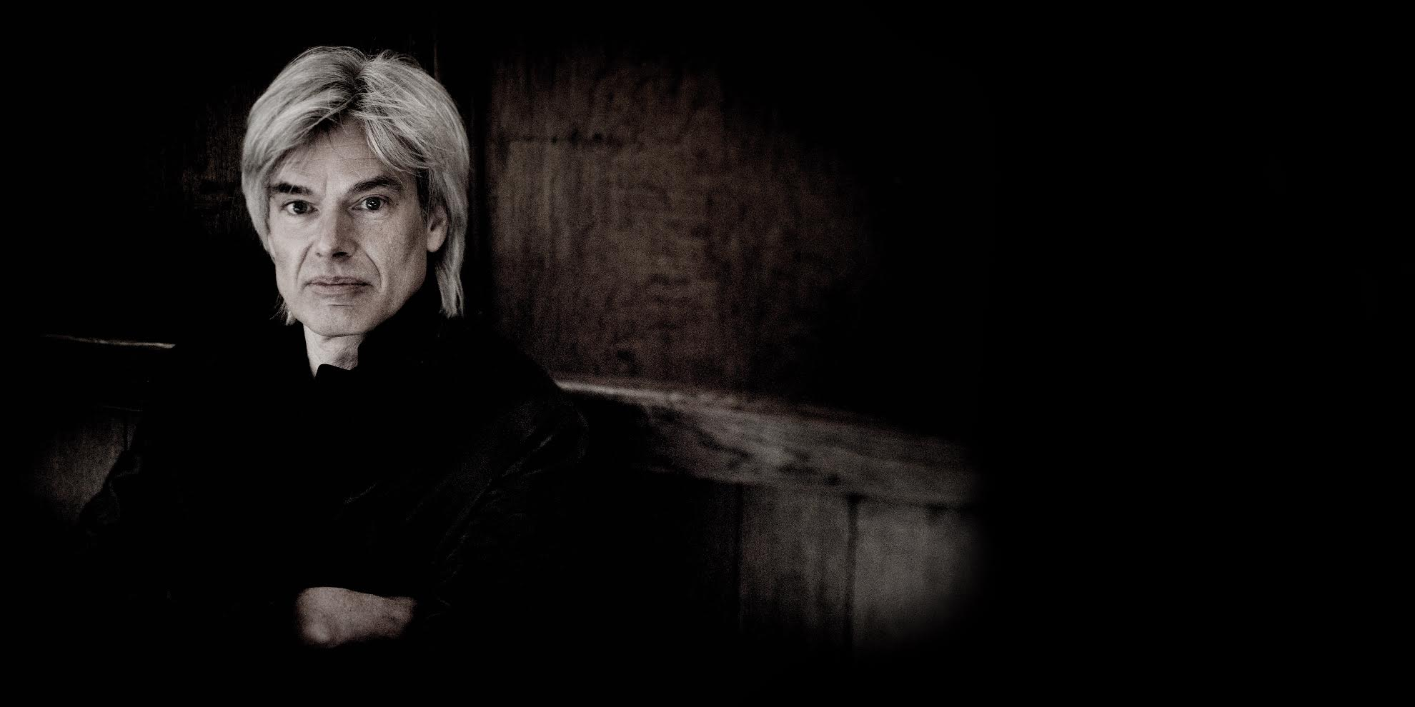 Videokunstenaar Arent Weevers